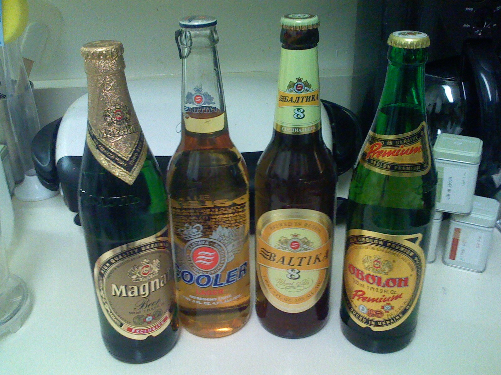 Russian beer.